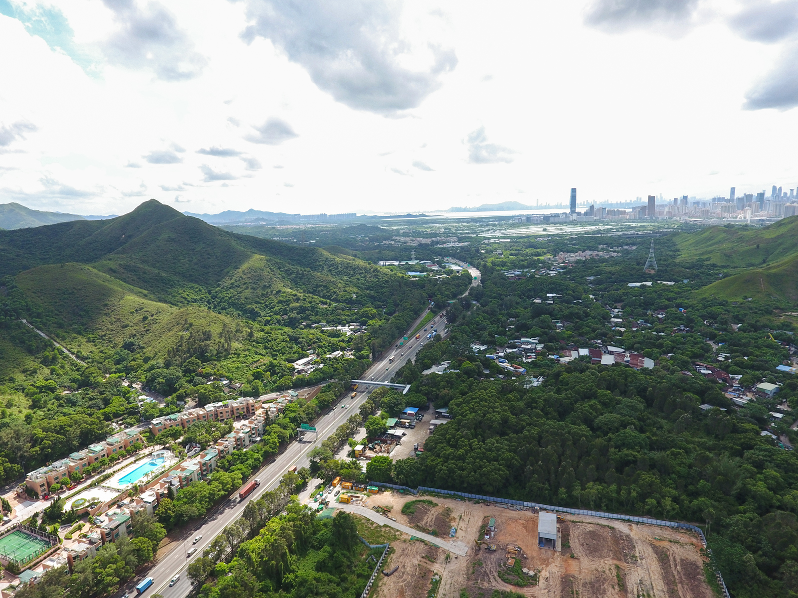 Pak Shek Au